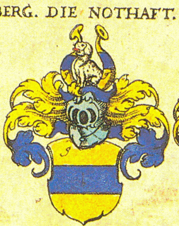 Wappen der Familie von Notthafft